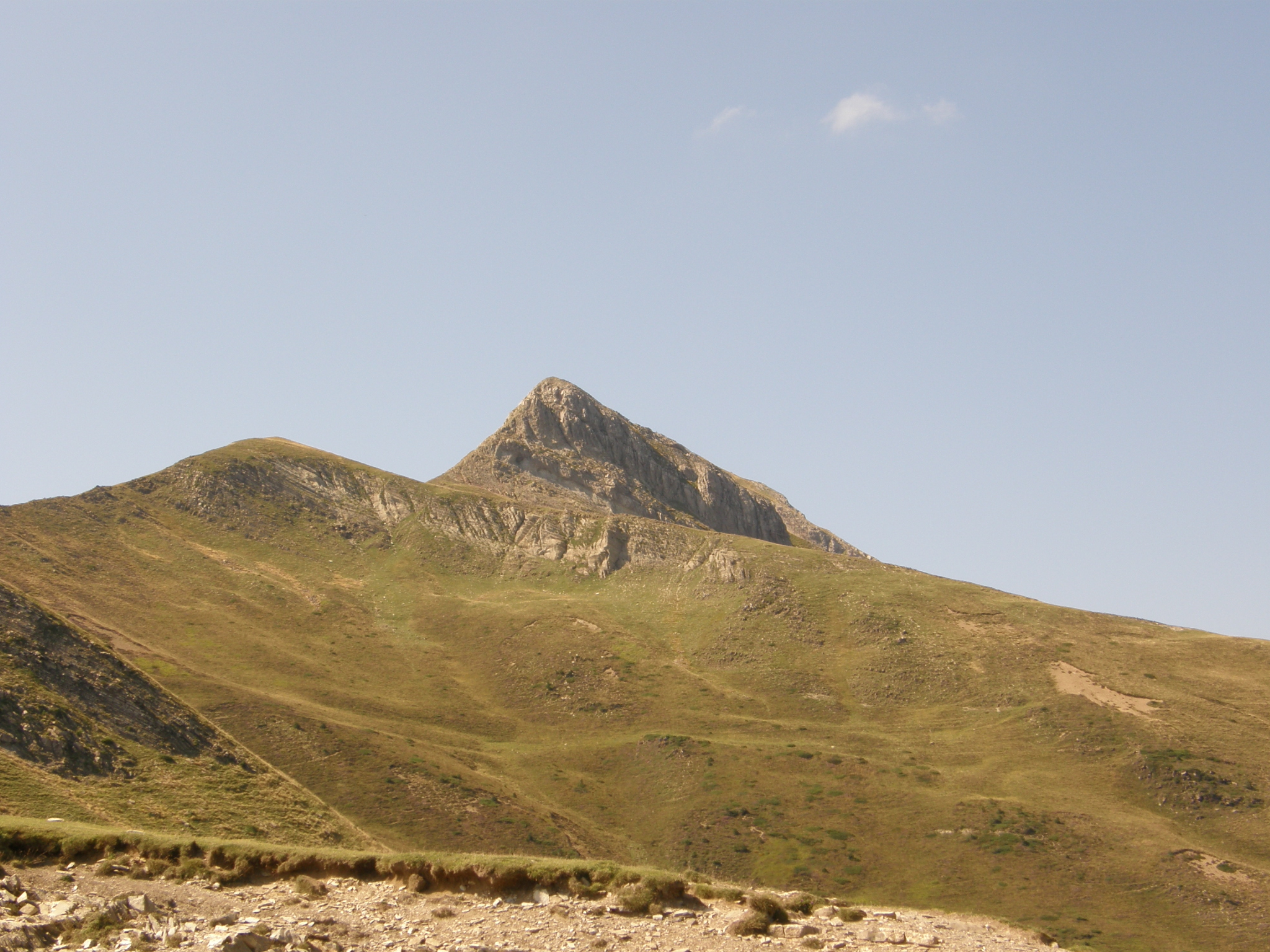 Pic d'orhy depuis le col de larrau